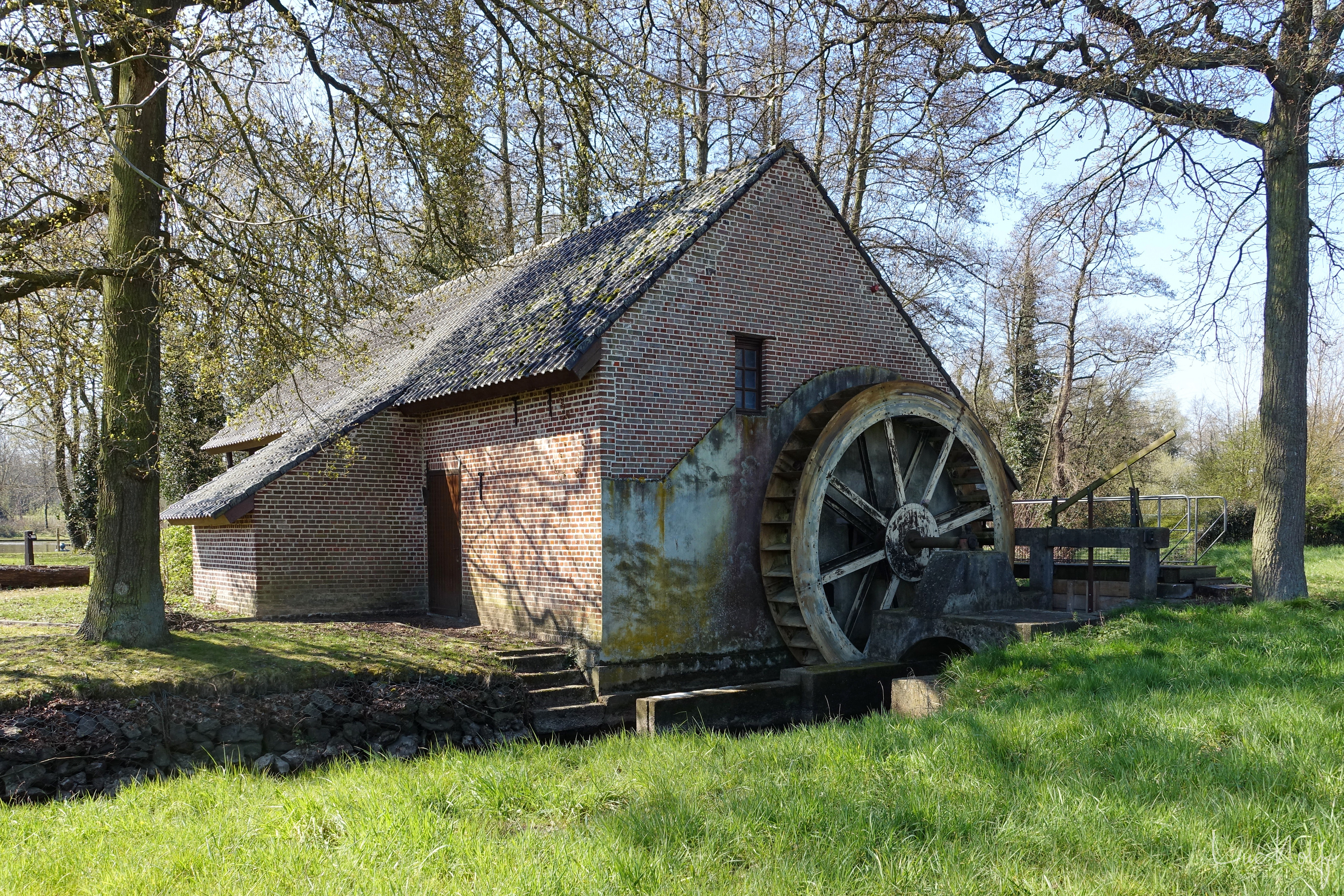 De Klaaskensmolen in Neeroeteren